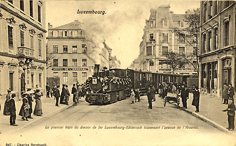 De Chareli an der Arsenalstrooss, haut Avenue Émile-Reuter.